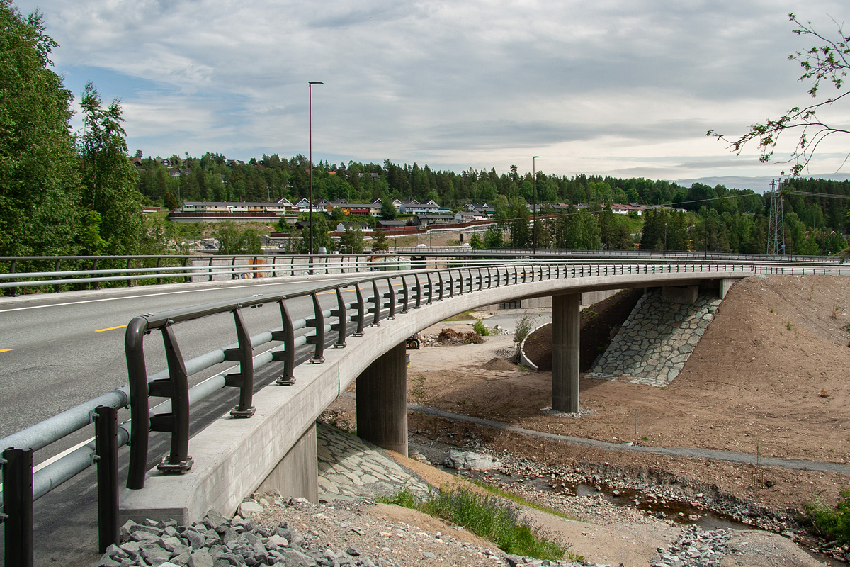 Sellikdalen bru på Fv2779.